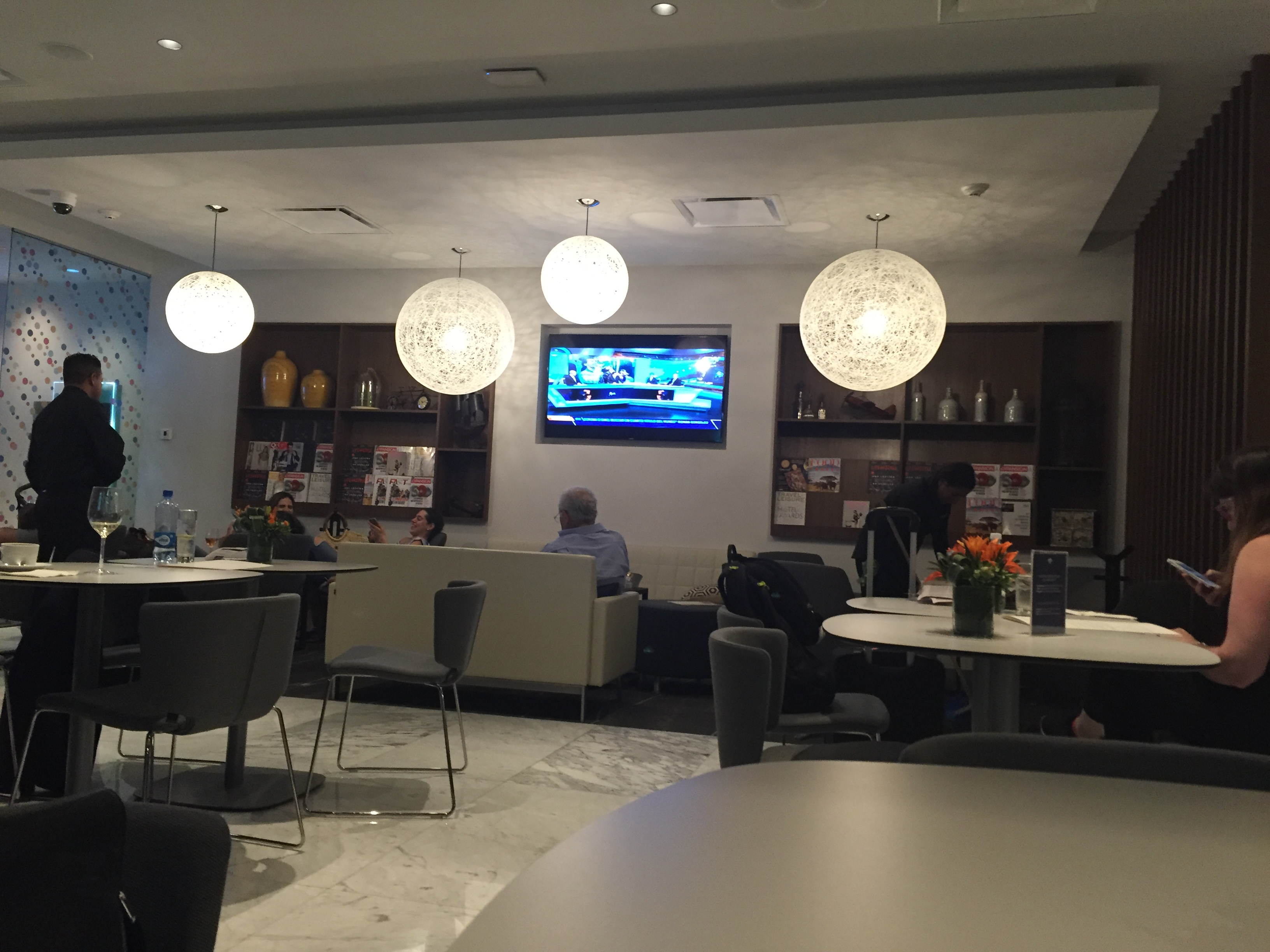 Salón VIP American Express Lounge en la Terminal 1 del Aeropuerto Internacional de la Ciudad de México.